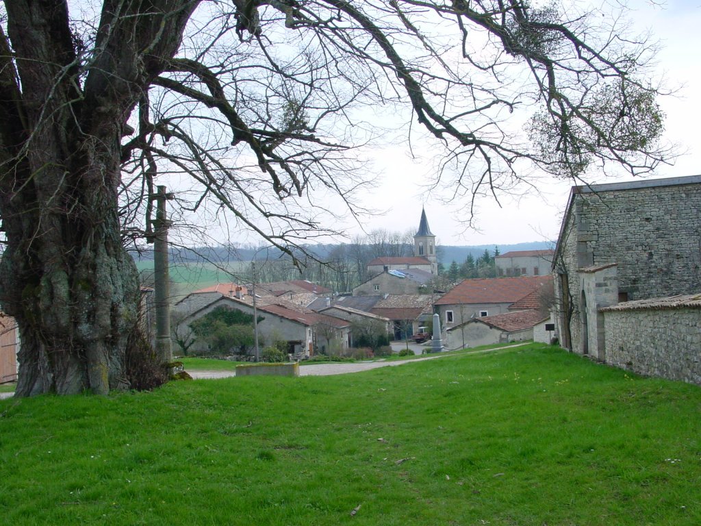 Le village de Vaux-la-Petite (Saulvaux, Meuse)